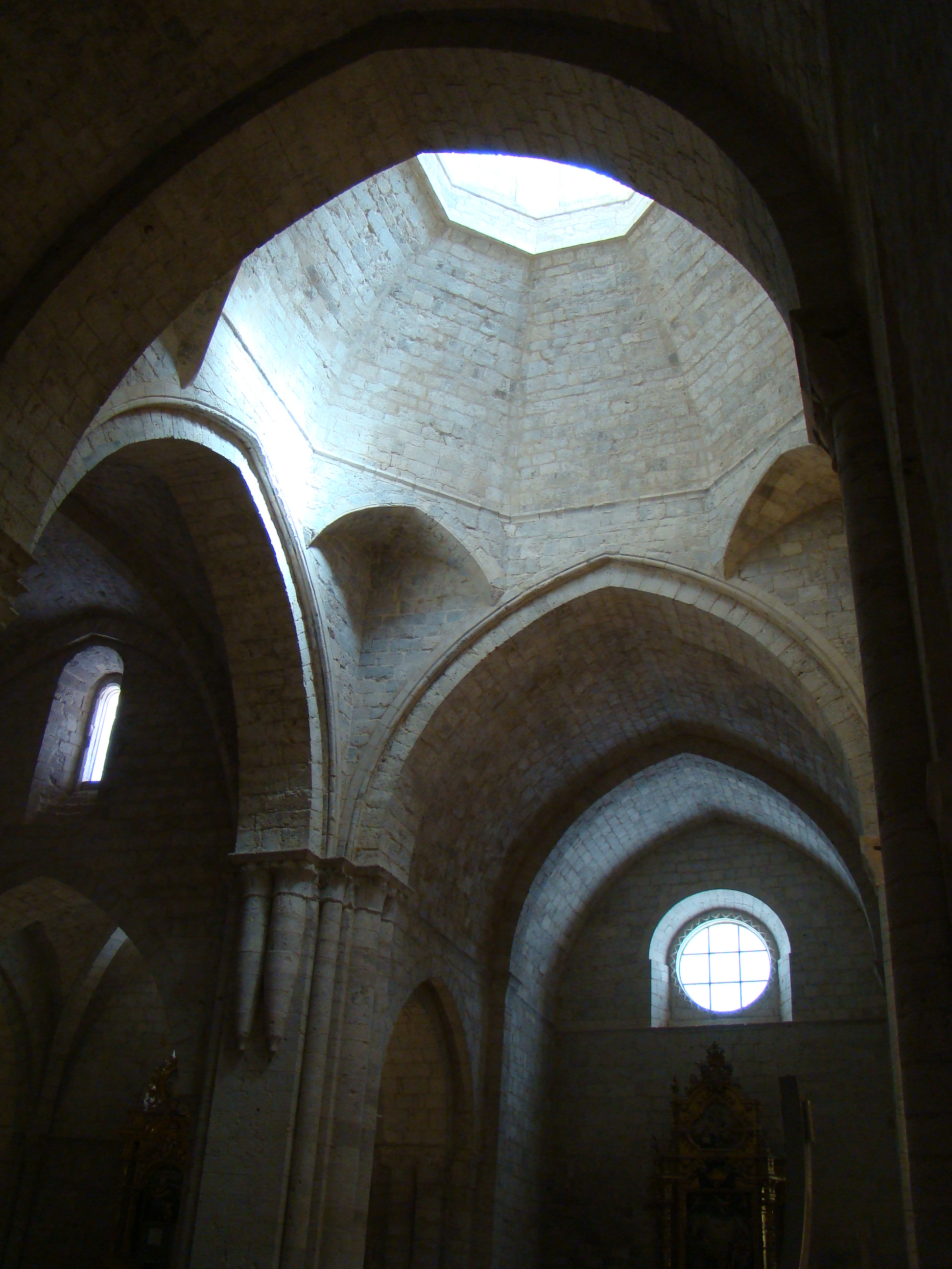 Valbuena de Duero, Valladolid, España. Monasterio de Santa María de Valbuena. Cimborrio de la iglesia.